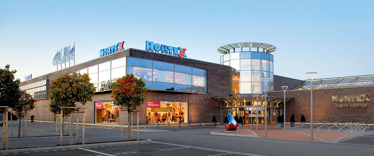 Der 1997 eingeweihte Neubau der Nortex am Grünen Weg 9-11 in Neumünster.